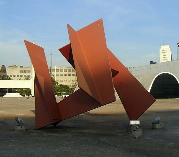 Grande Flor Tropical, escultura de Franz Weissmann no Memorial da América Latina, São Paulo, Brasil.